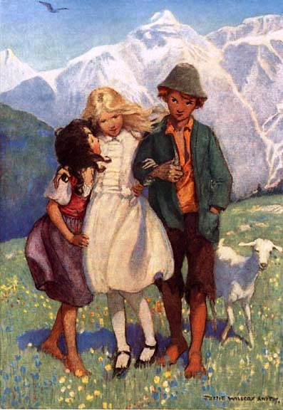 grafika